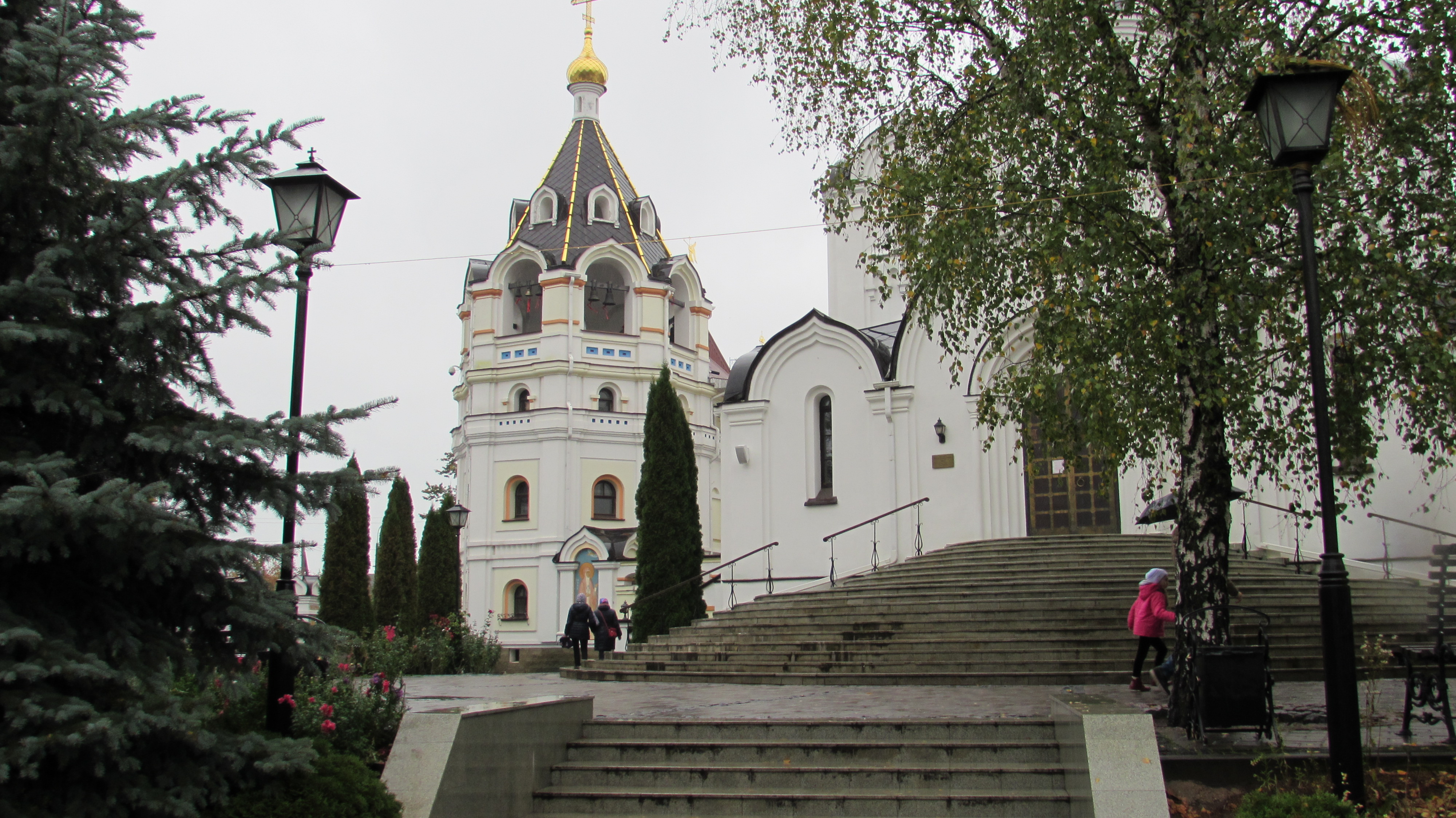 MinskElisabethKloster